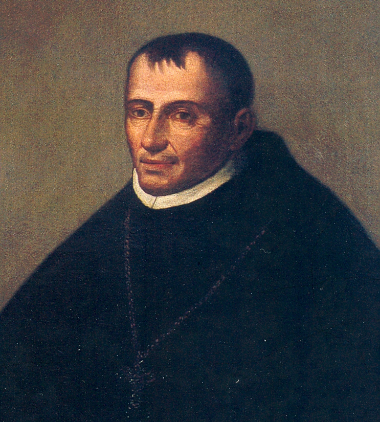 Fray Antonio Hervias (†1590), rector de la Universidad de San Marcos y obispo de Cartagena de Indias (detalle)